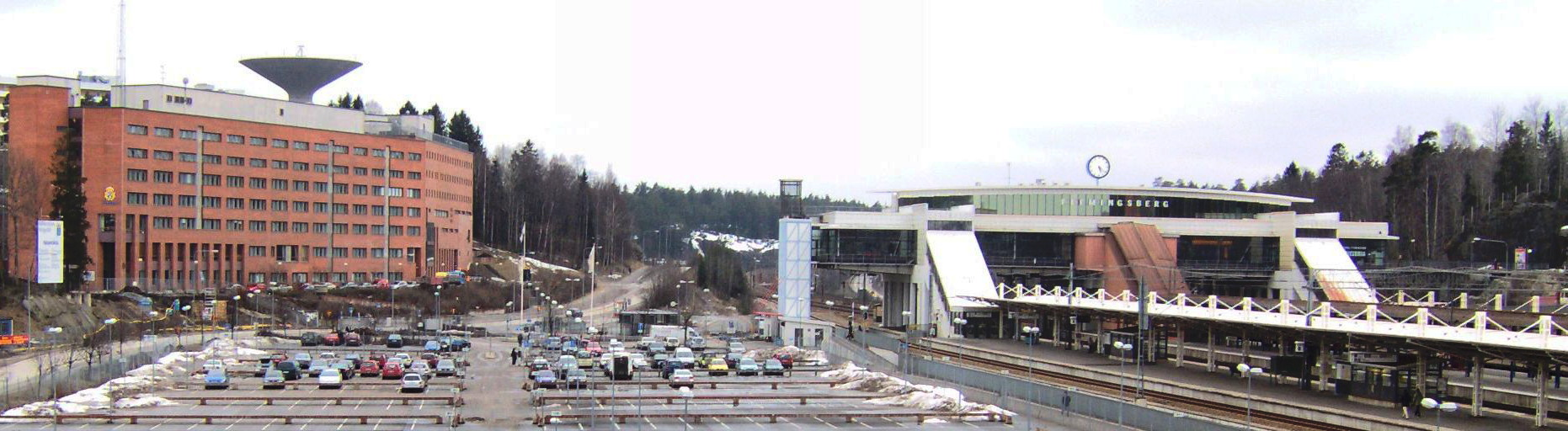 Flemingsbergs järnvägstation, med en skymt av Södertörns tingsrätt till vänster och Södertörns polishus och Huddinge häkte i Flemingsberg. Strax efter det södra vita stationshuset delar sig spåren för Södra stambanans grödingespår till Södertälje Syd och pendeltågspåren till Södertälje hamn och centrum.